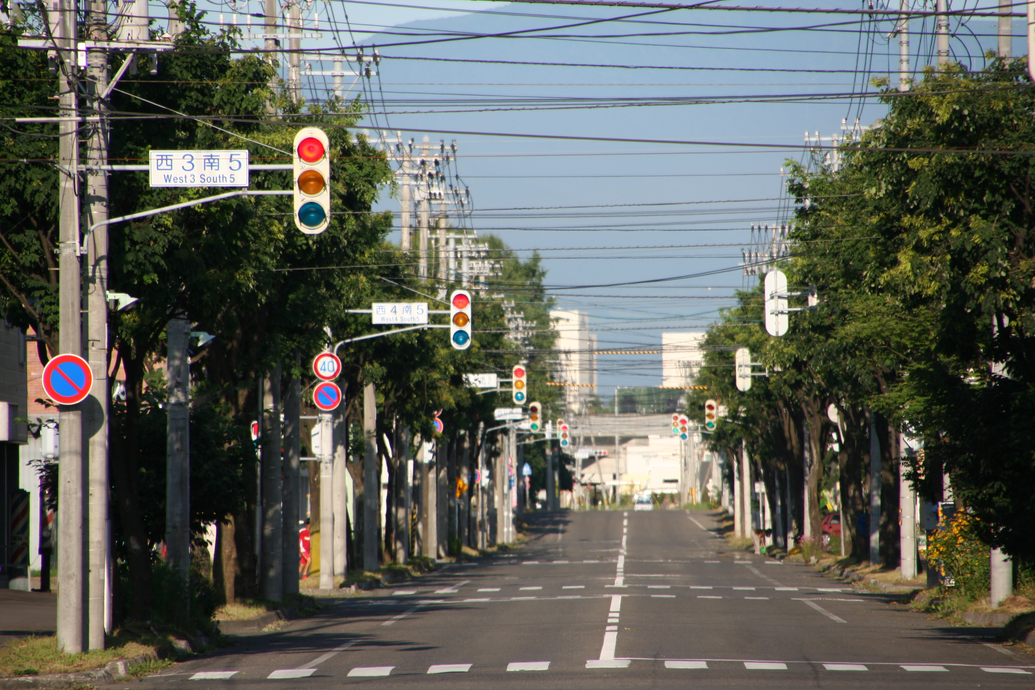 帯広